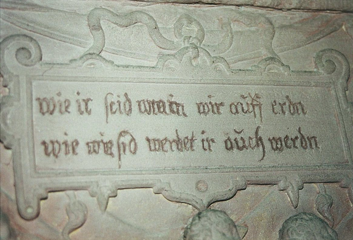 Gemünden_Epitaph_Detail2